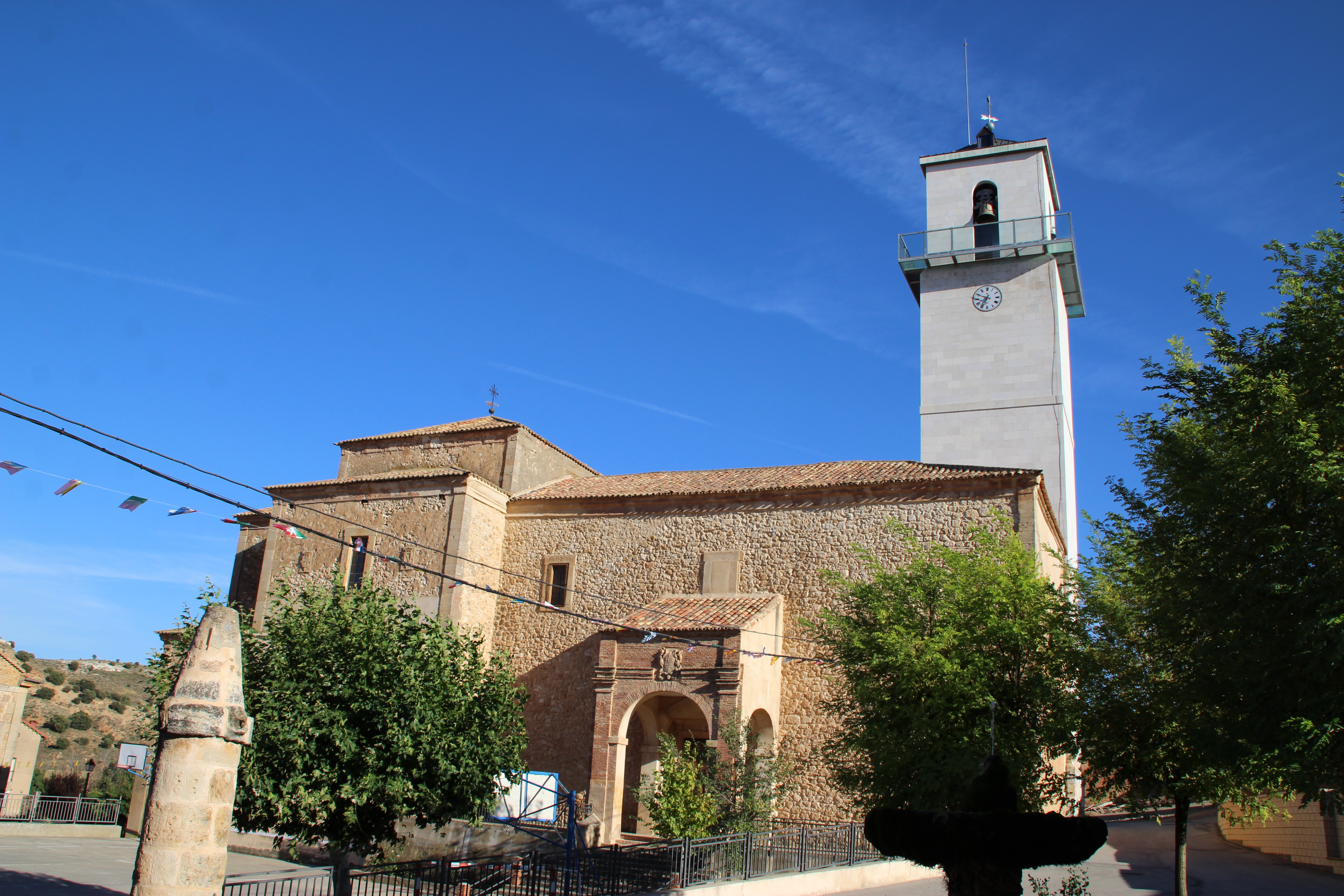 Iglesia Parroquial de la Santa Cruz - VELAMAZÁN (Soria).